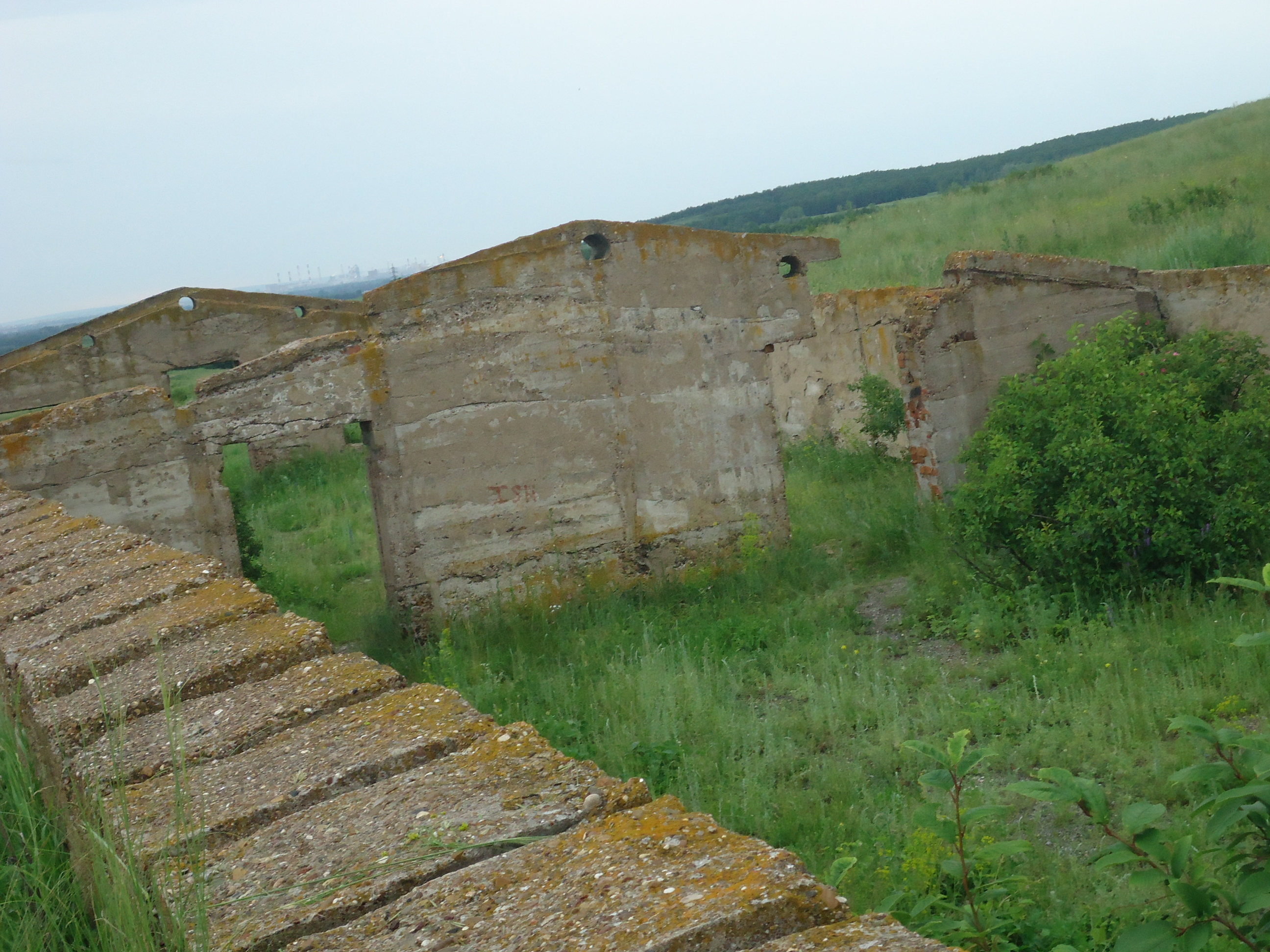 Башҡортса: Элекке каторга режимлы лагерь урыны. Барак ҡалдыҡтары. Торатау.